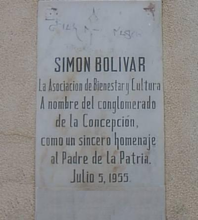 Ubicada en la Plaza Bolivar